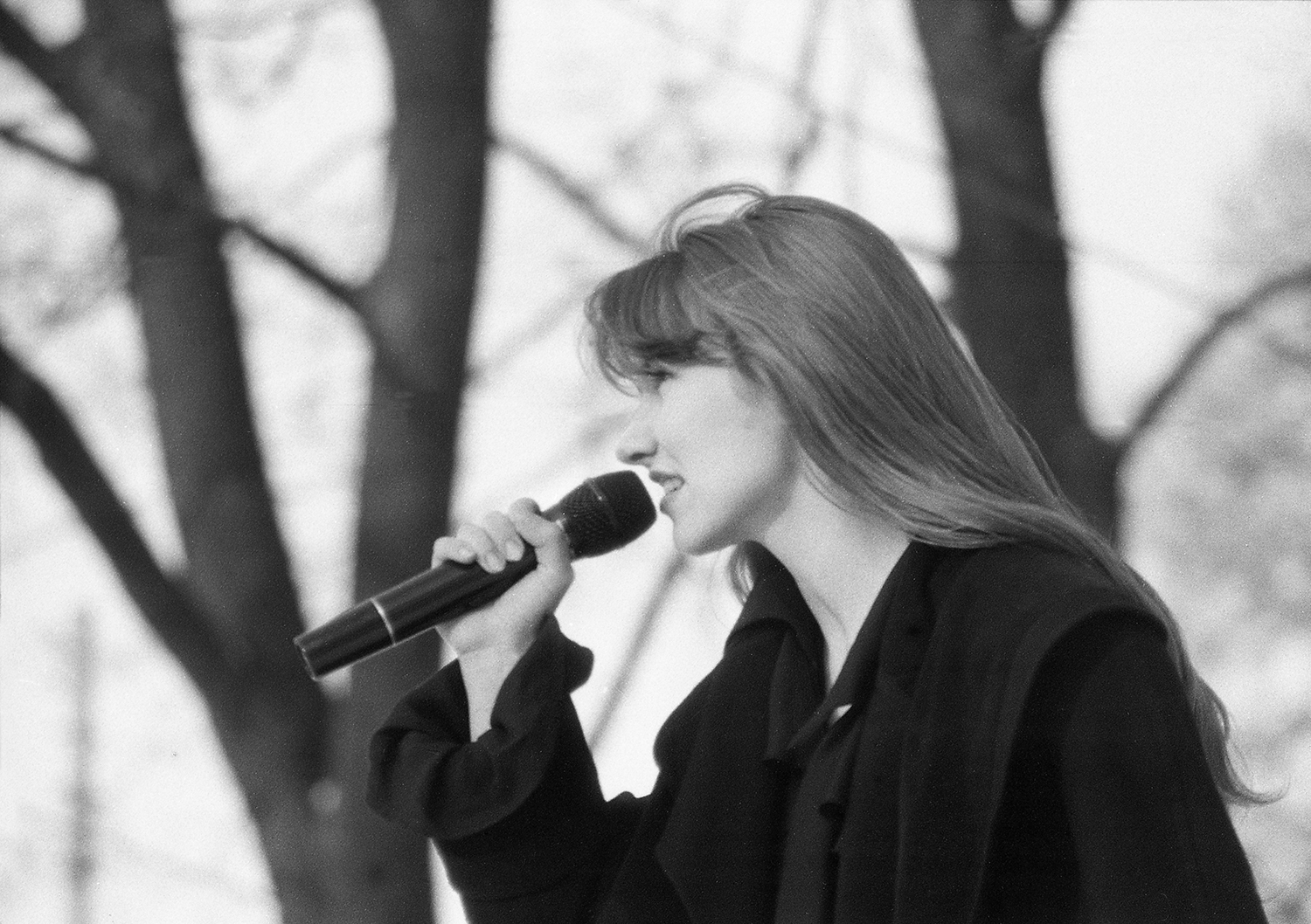 Janika Sillamaa, Pärnu rannas 1994